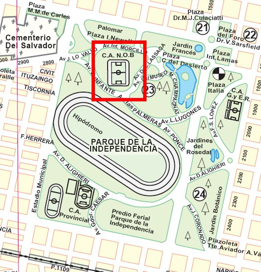 Ubicación del Estadio "El Coloso del Parque"